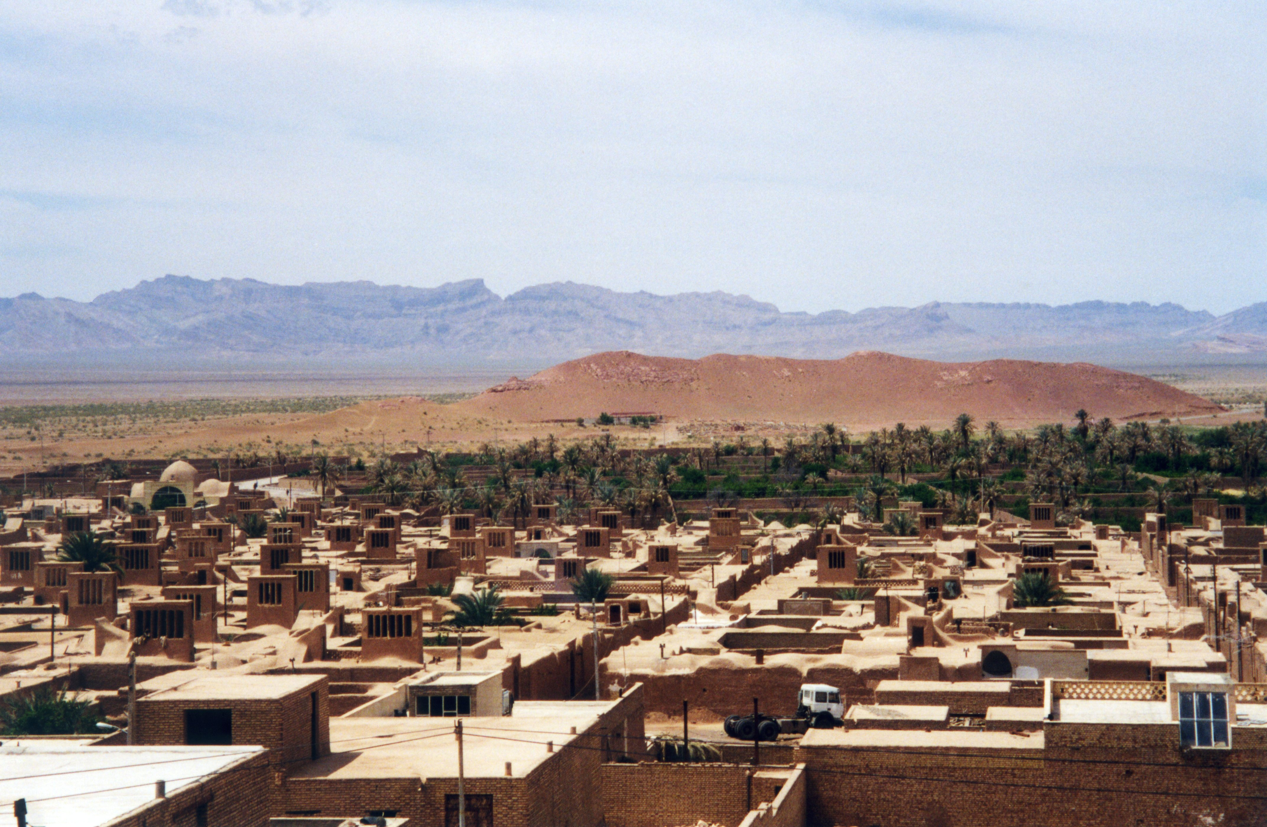 Iran - le désert Dasht-e-Kavir - village dans le désert iranien. Tous les toits sont surmontés d'un badgir ou « tour du vent » wind catchers (en persan : بادگیر, littéralement « attrape-vent »), un élément traditionnel d'architecture persane utilisé depuis des siècles pour créer une ventilation naturelle dans les bâtiments. Le mot perse "dash" signifie “desert”.